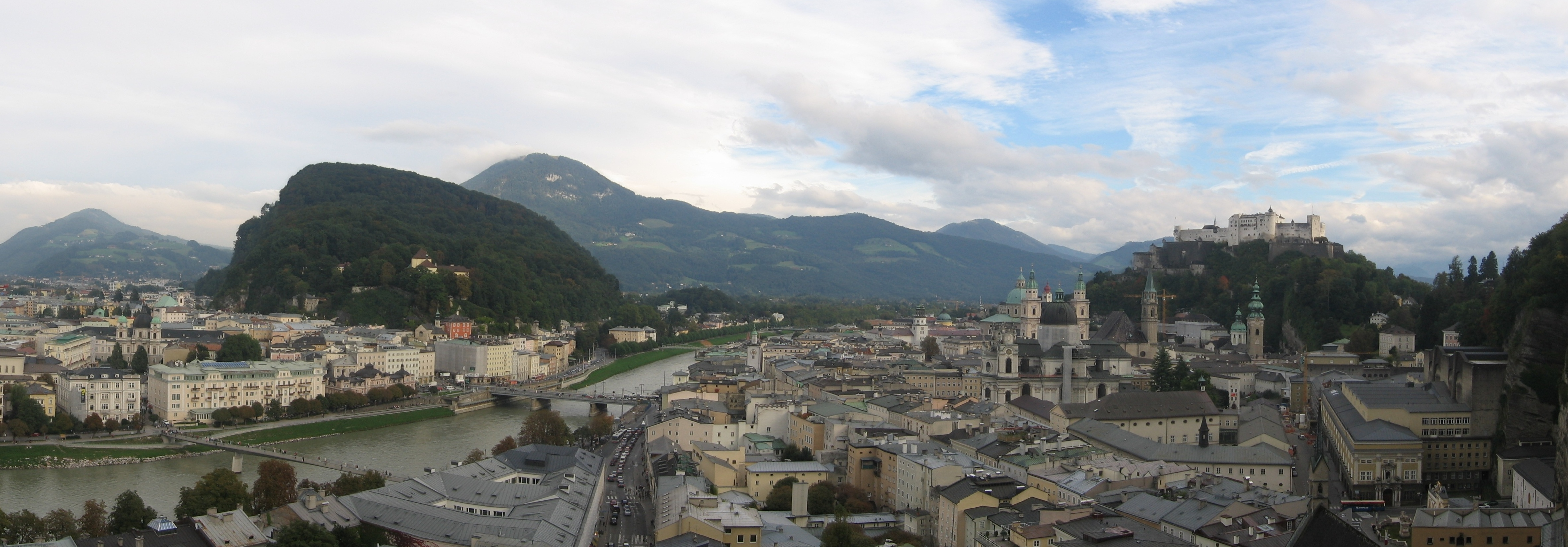 Panorama image of Salzburg taken from the Monchsberg (Mönchsberg). It can be seen kapuzinerberg, Salzach river and Fortress (Festung)